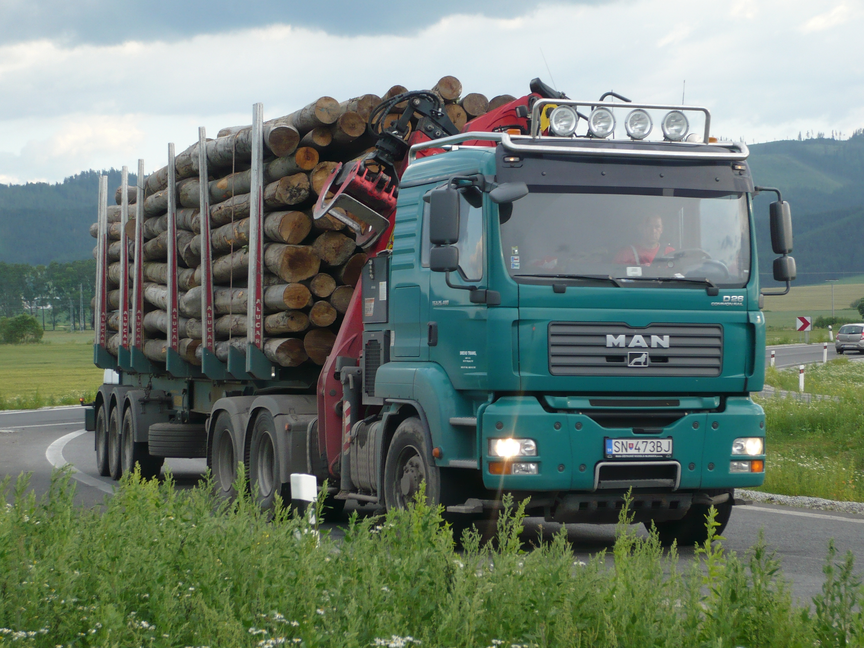 MAN TGA 26.480 L 6x4 Drevo Trans